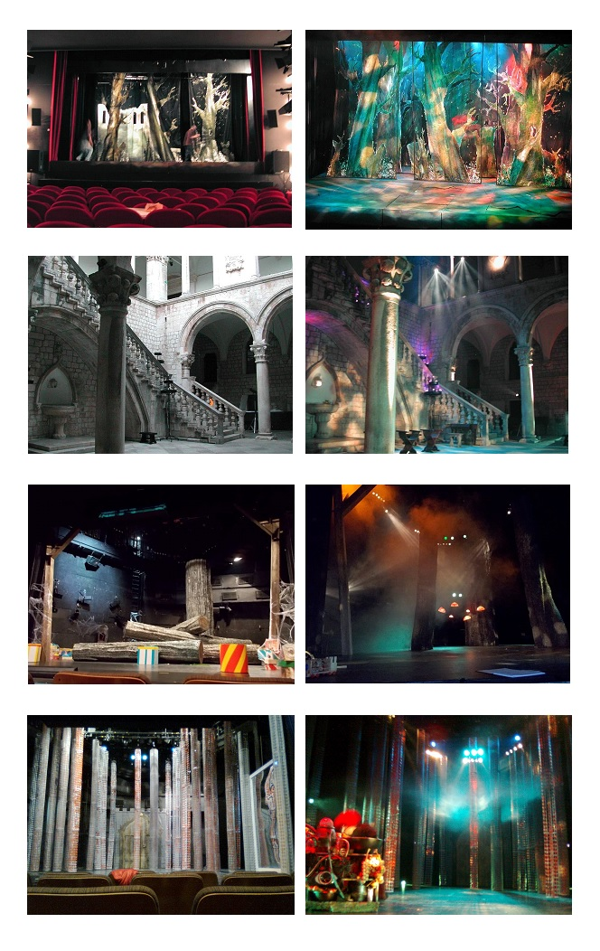 the influence of stage light